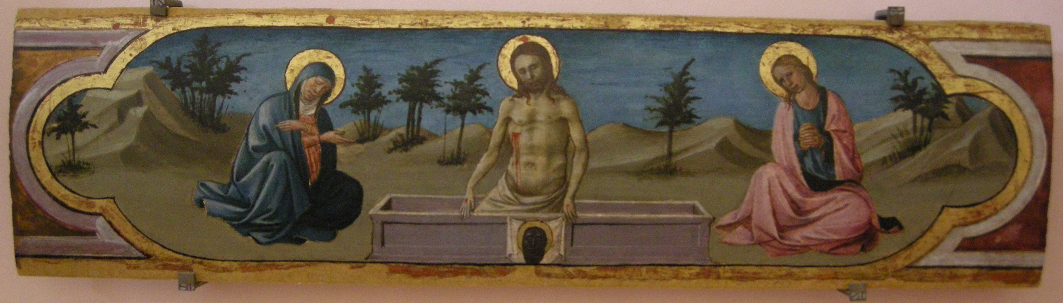 Domenico di michelino, cristo in pietà tra la vergine e san giovanni evangelista